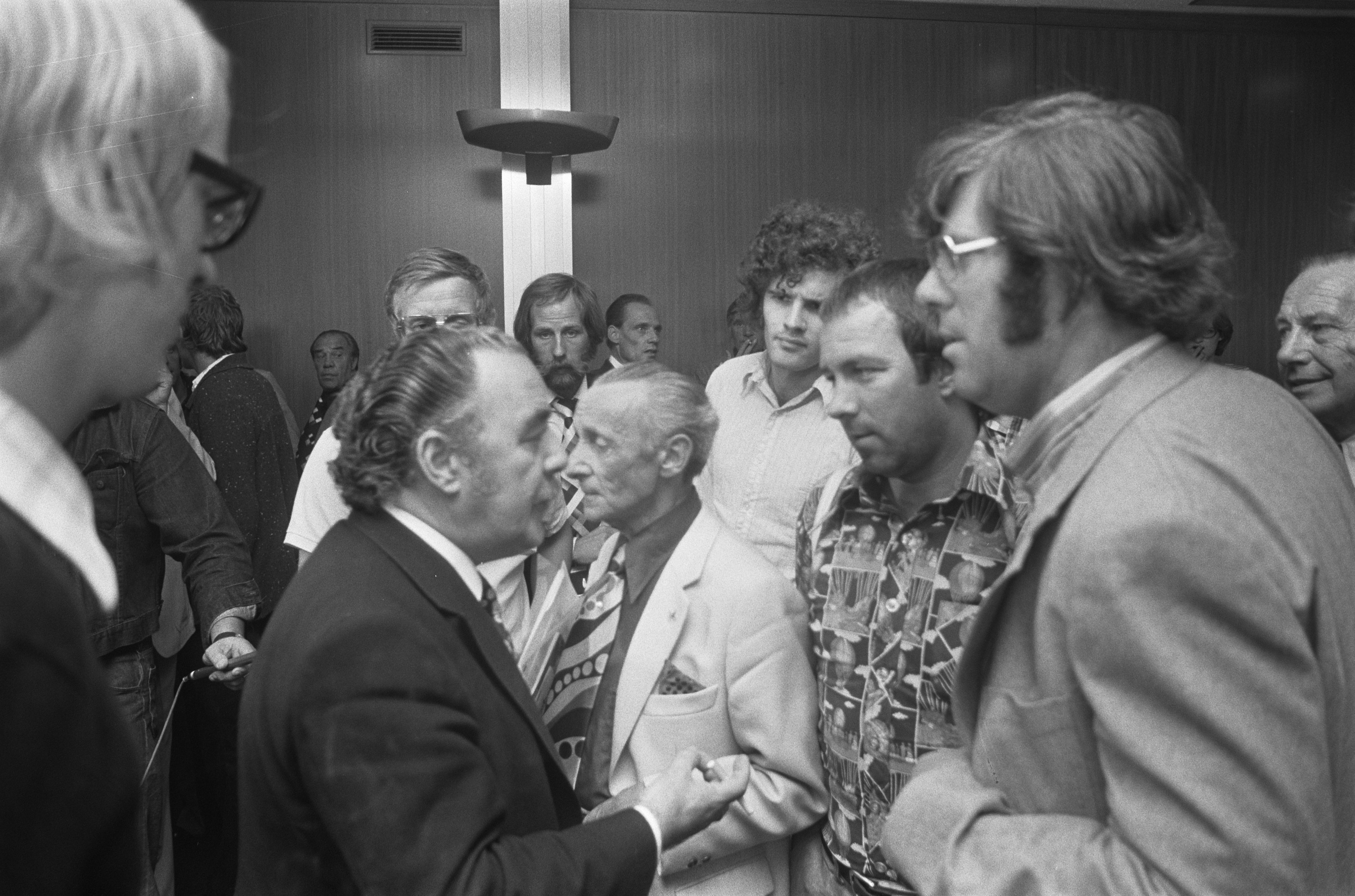 Collectie / Archief : Fotocollectie Anefo Reportage / Serie : [ onbekend ] Beschrijving : Evert Grifhorst (l) KNVB-persvoorlichter, rechts sportjournalist Joop Niezen Datum : 29 augustus 1974 Trefwoorden : journalisten Persoonsnaam : Grifhorst, Evert, Niezen, Joop Instellingsnaam : Firato Fotograaf : Peters, Hans / Anefo Auteursrechthebbende : Nationaal Archief Materiaalsoort : Negatief (zwart/wit) Nummer archiefinventaris : bekijk toegang 2.24.01.05 Bestanddeelnummer : 927-4181